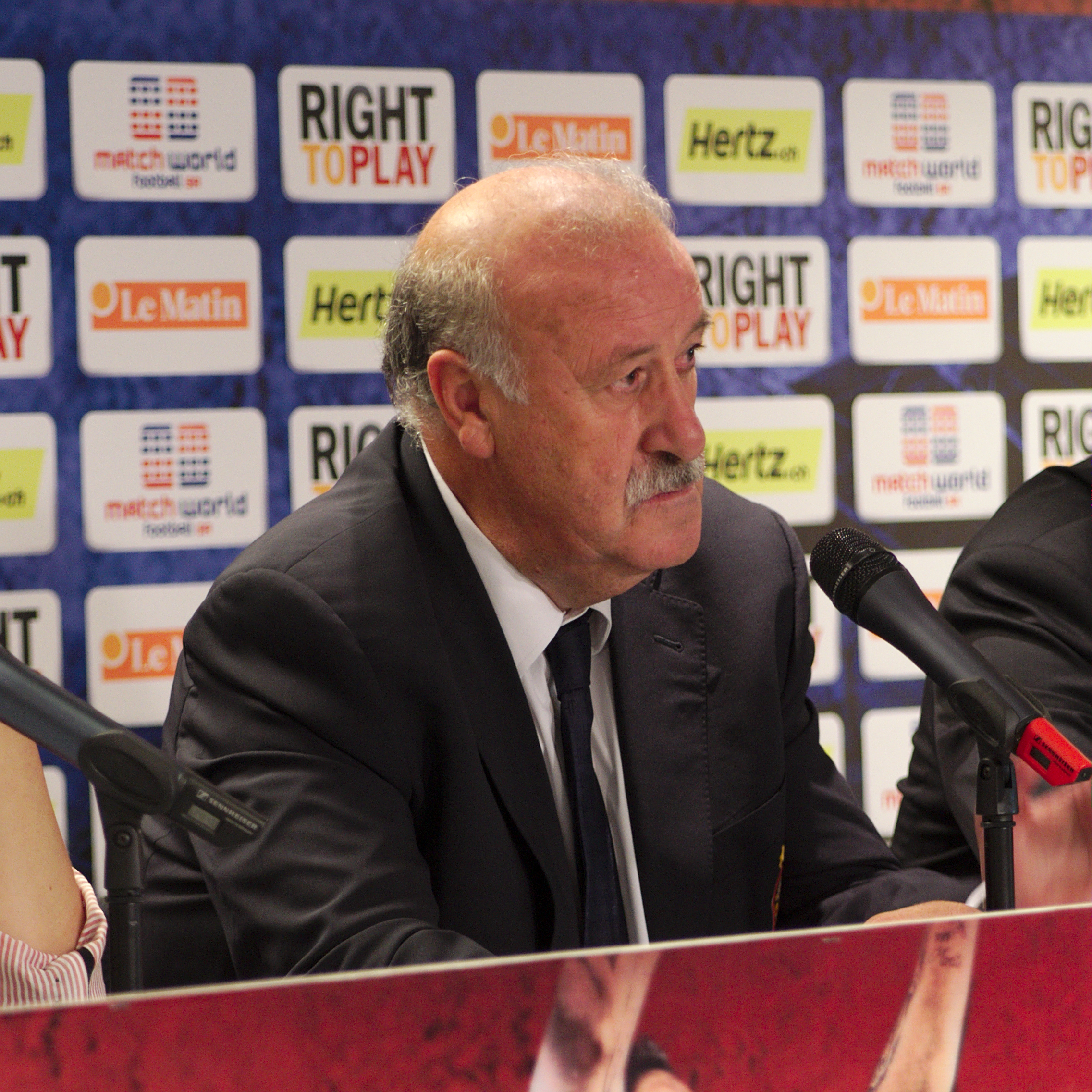 Spain - Chile - 10-09-2013 - Geneva - Vicente Del Bosque